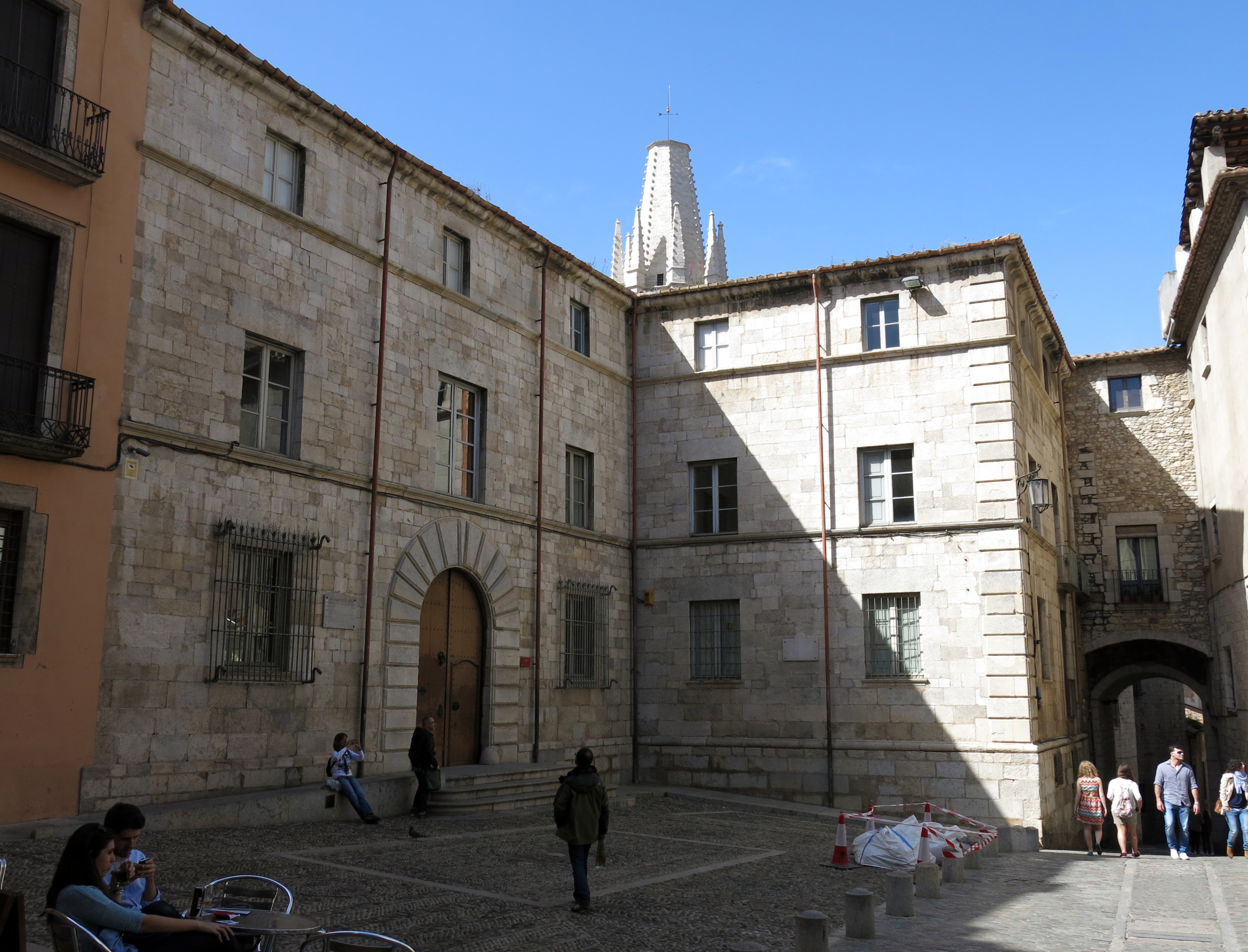 Plaça de la Catedral (Girona)